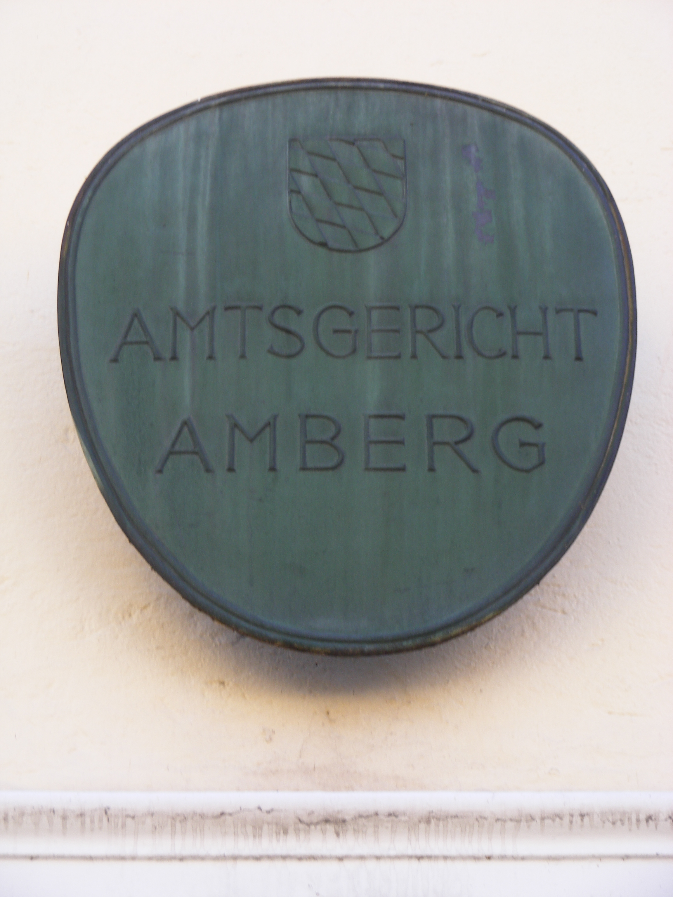 Amberg - Amtsgericht (Schild)